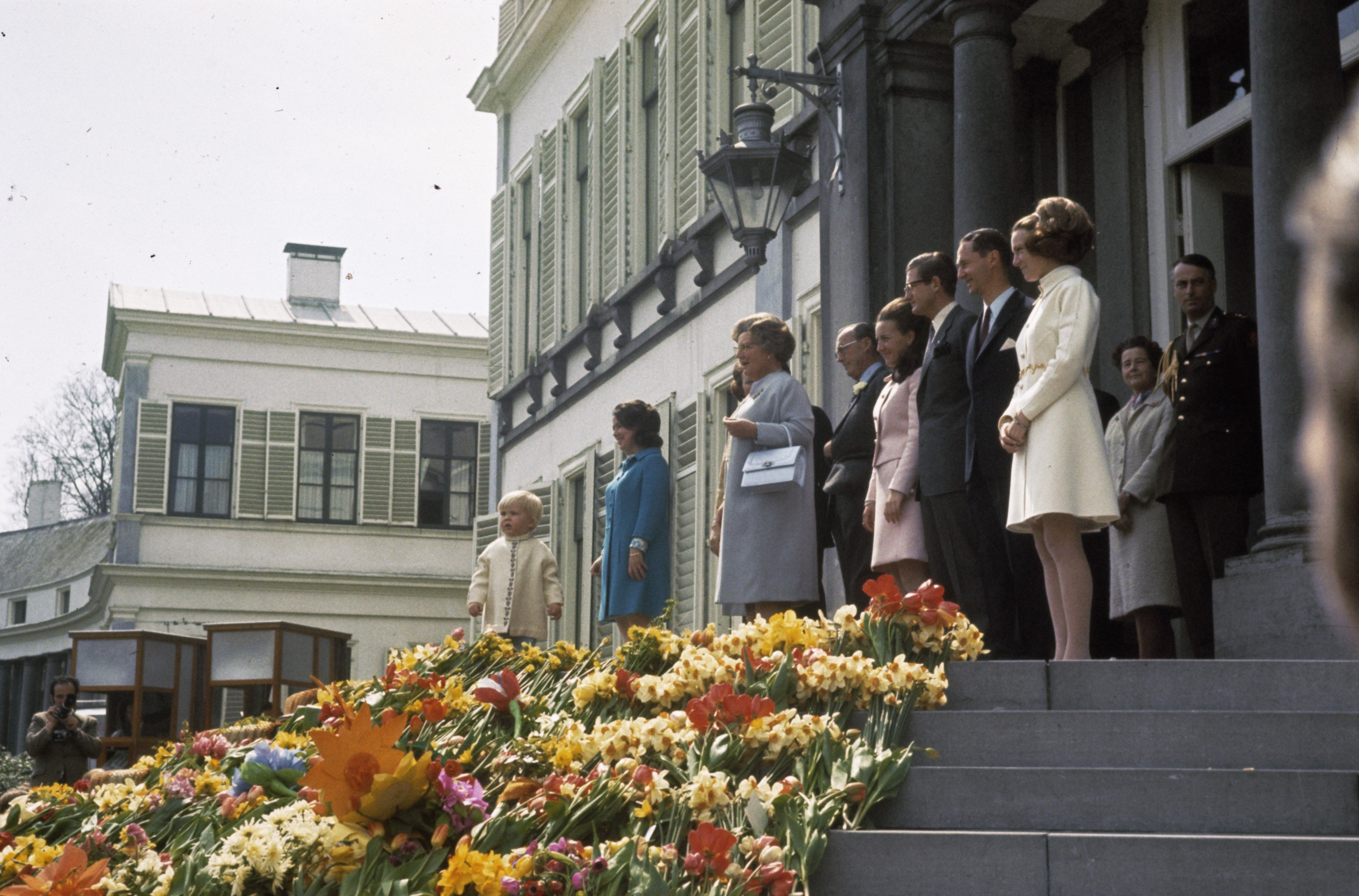 Collectie / Archief : Fotocollectie Anefo Reportage / Serie : [ onbekend ] Beschrijving : Koninginnedag; Koninklijke Familie op bordes Datum : 30 april 1969 Trefwoorden : Koninginnedag, bordessen Fotograaf : Koch, Eric / Anefo Auteursrechthebbende : Nationaal Archief Materiaalsoort : Dia (kleur) Nummer archiefinventaris : bekijk toegang 2.24.01.06 Bestanddeelnummer : 254-8481